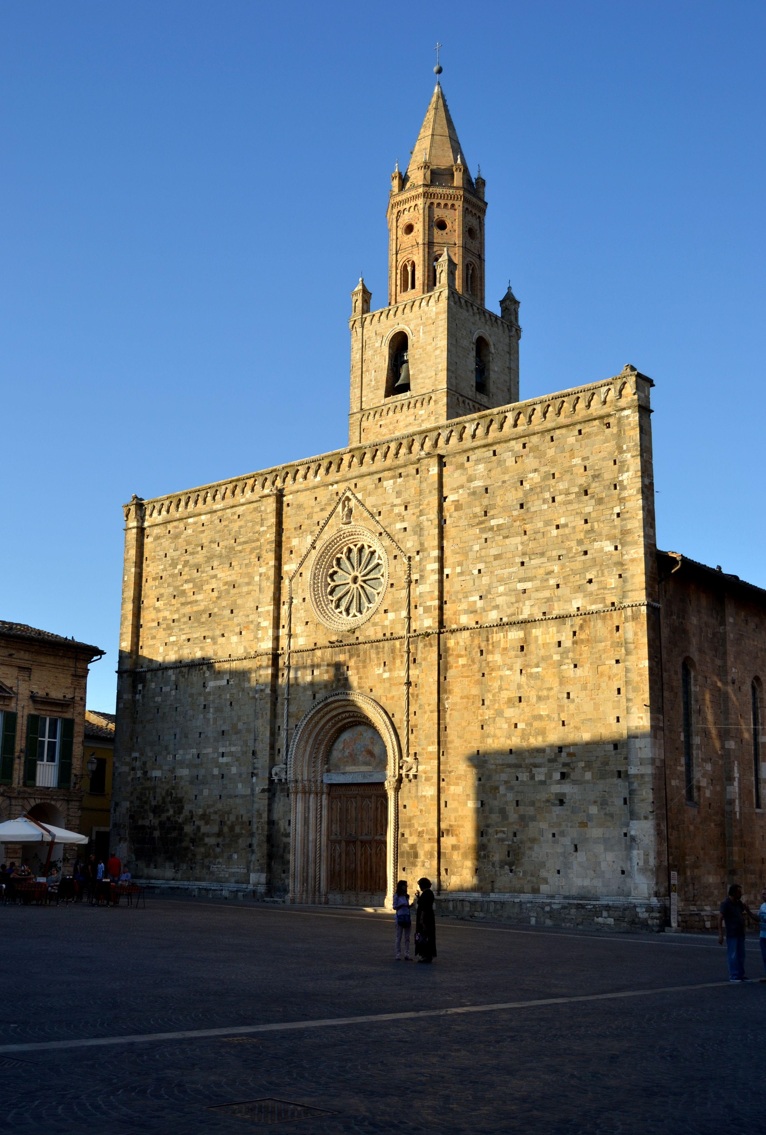 Concattedrale di Atri